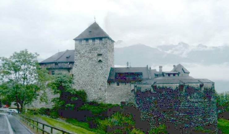 Kastelo de Vaduzo (LI)